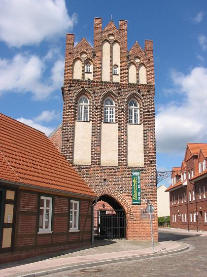 Steintor in Wittenberge, Prignitz, Brandenburg fotografiert im Juni 2005 von Lienhard Schulz